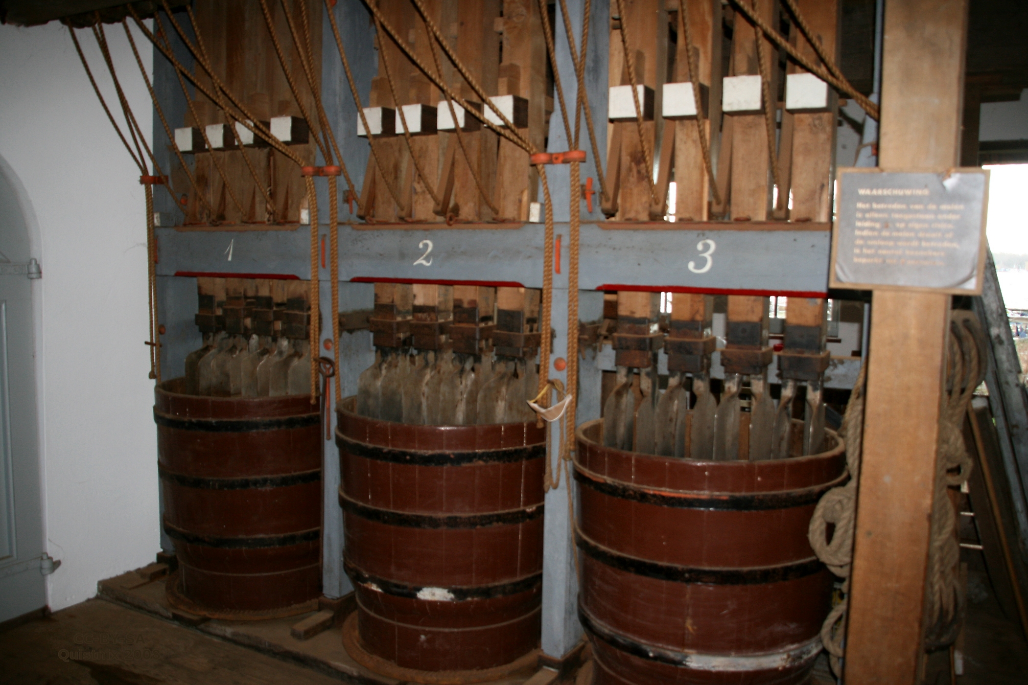 Rotterdam-Kralingen, windmolen De Ster: stampkuipen 1 t/m 3